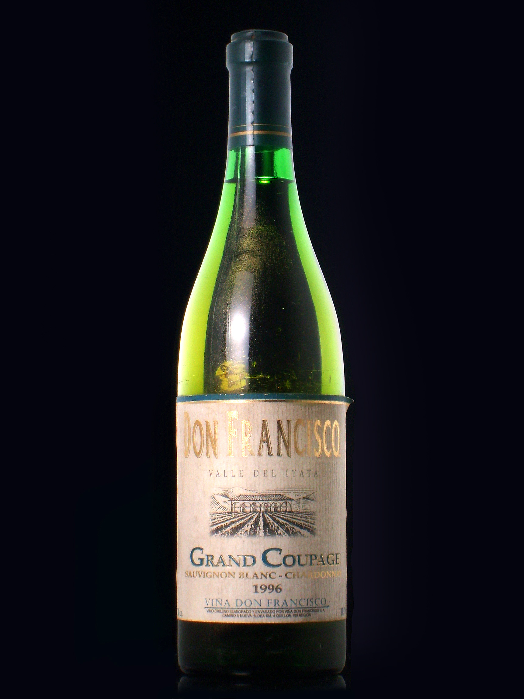 Botella de vino Don Francisco, tipo Sauvignon Blanc-Chardonnnay, año 1996. Elaborado y producido por Viña Don Francisco en Quillón, Chile.